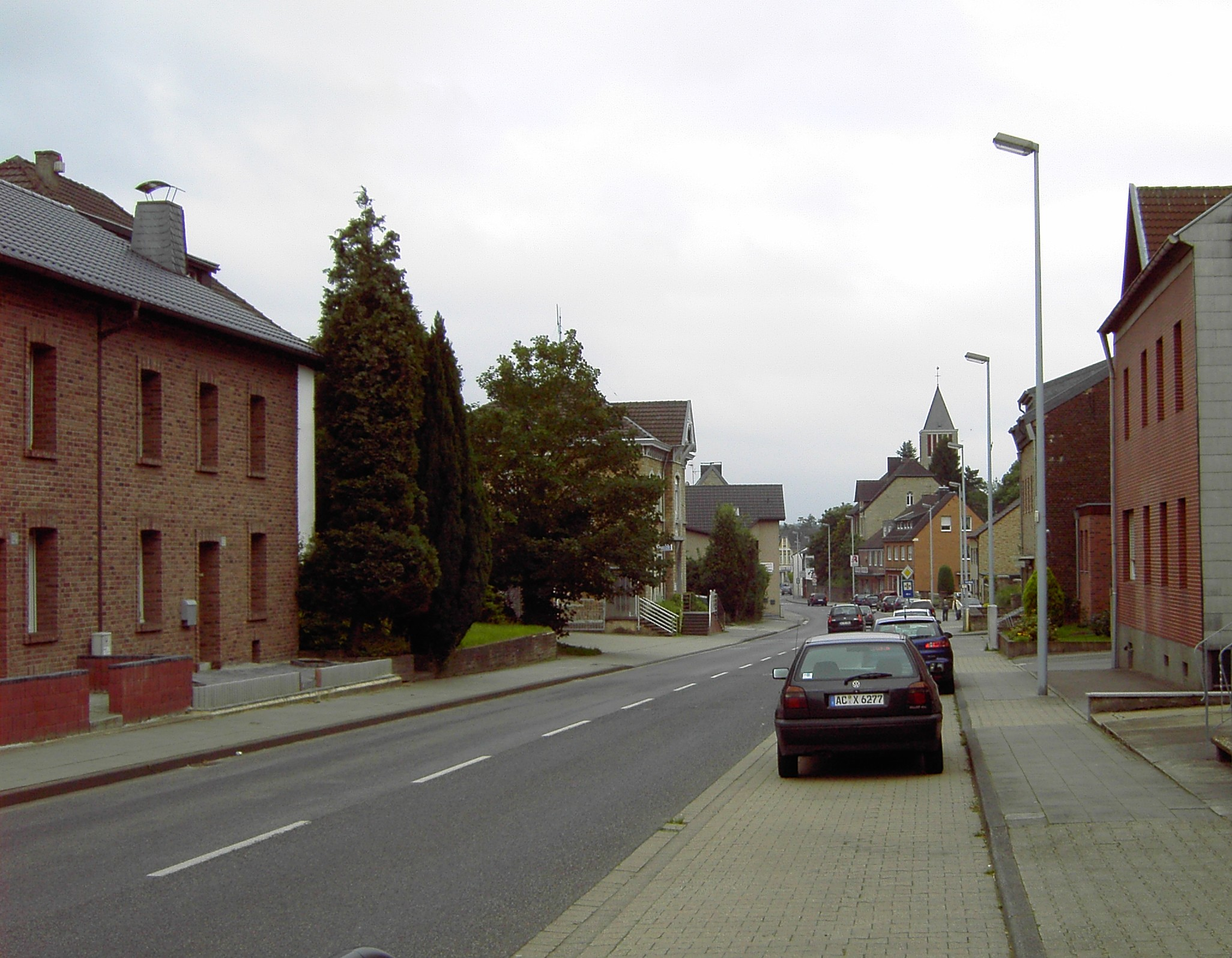 Blick auf die Hauptstraße (Gressenicher Straße) in Mausbach